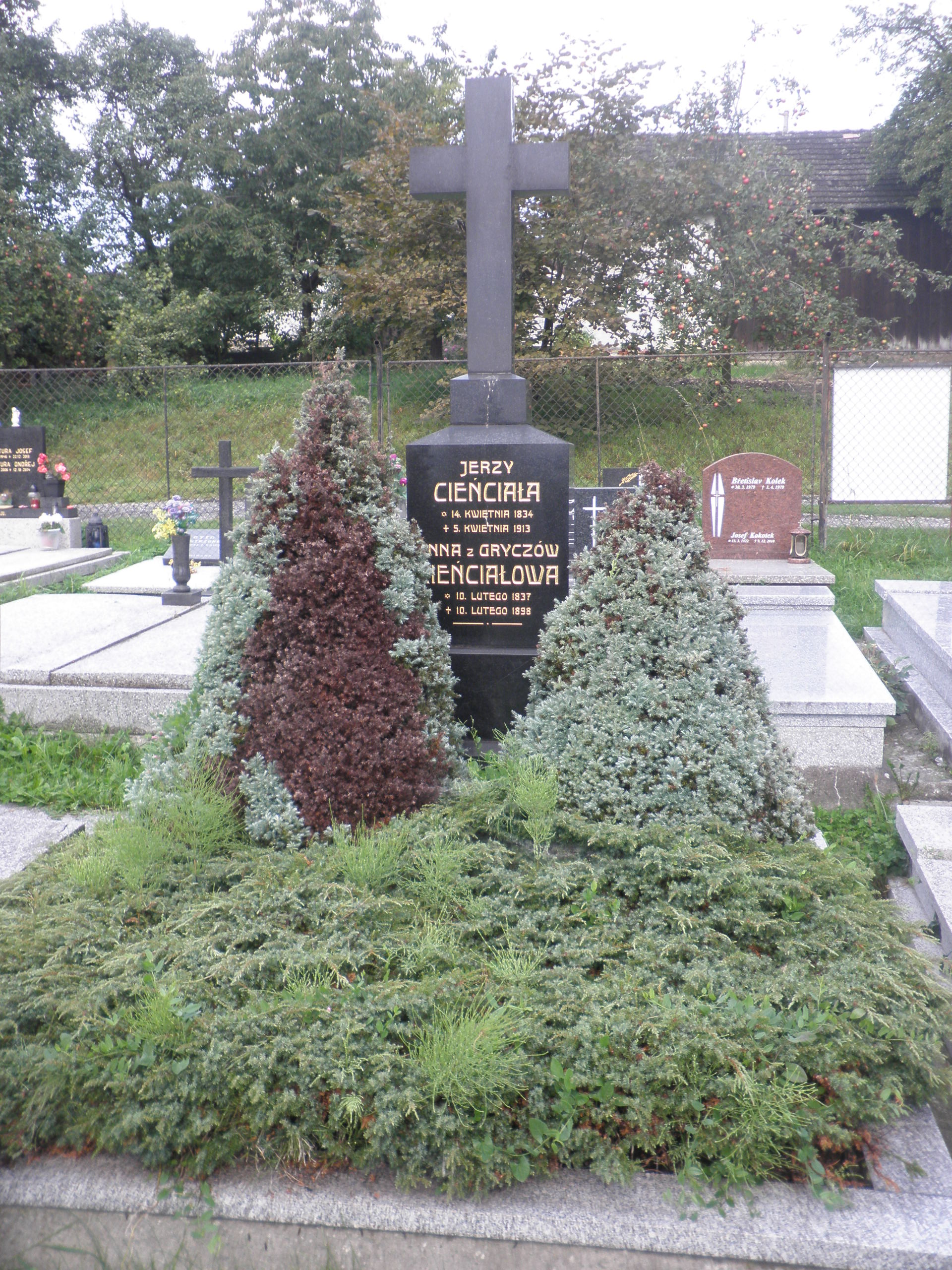 Evangelický hřbitov v Mistřovicích. Hrob poslance Jerzyho Cienciały.